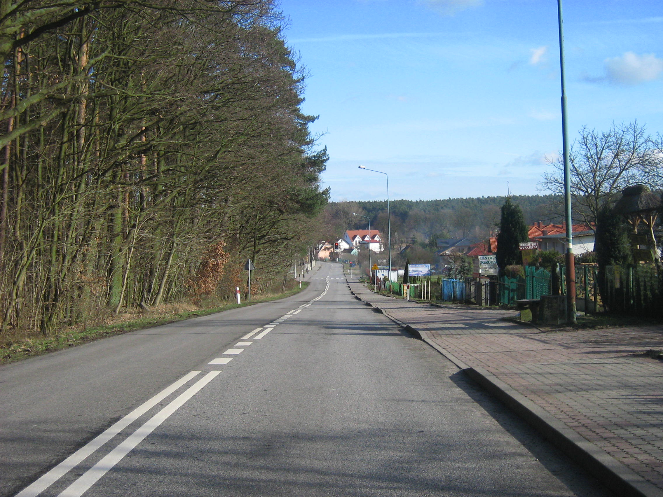 Droga wojewódzka nr 102 w Wisełce. Widok w kierunku Kamienia Pomorskiego.